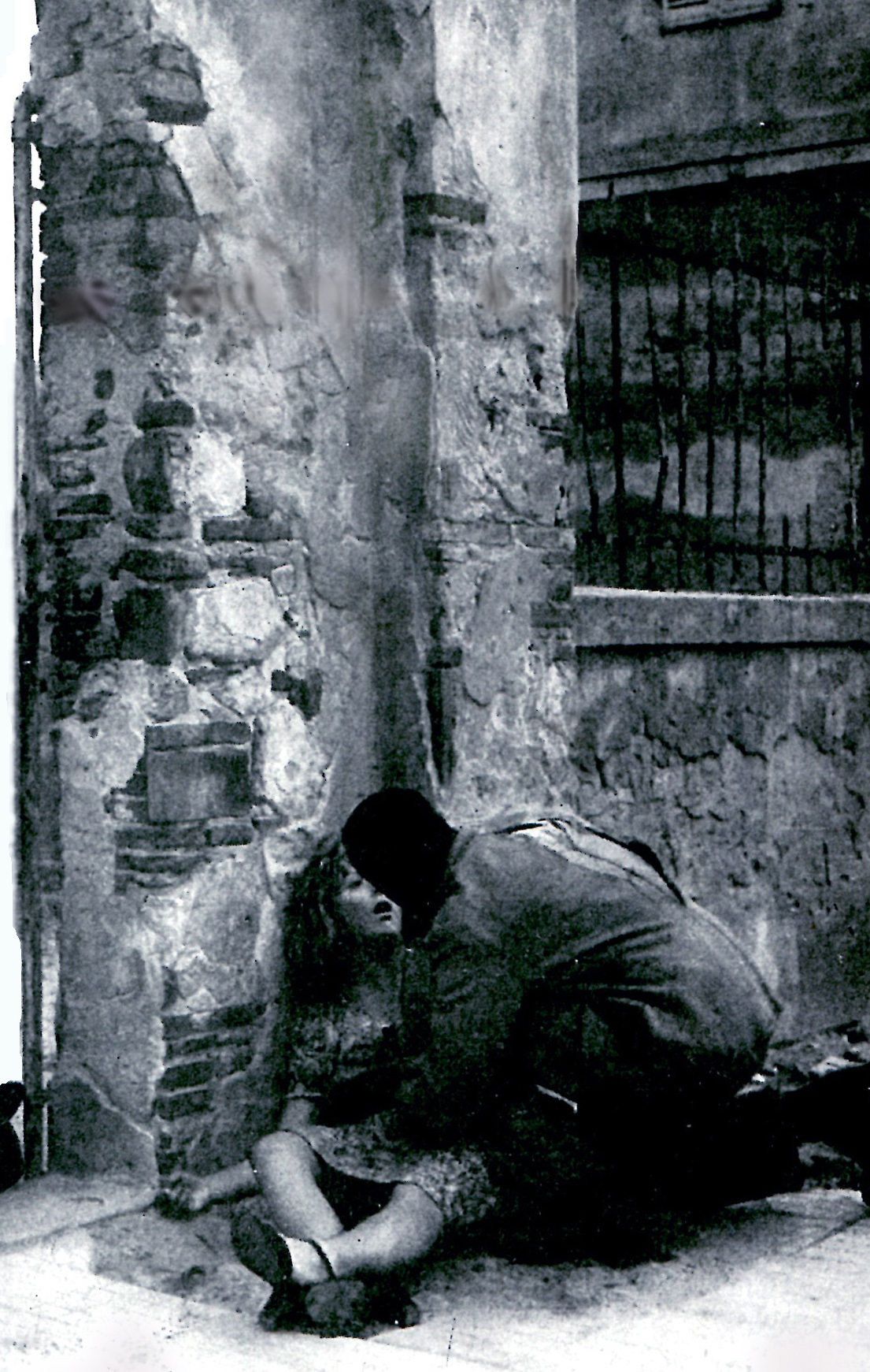 Carla Del Poggio e John Kitzmiller in "Senza pietà" (Lattuada, 1948)